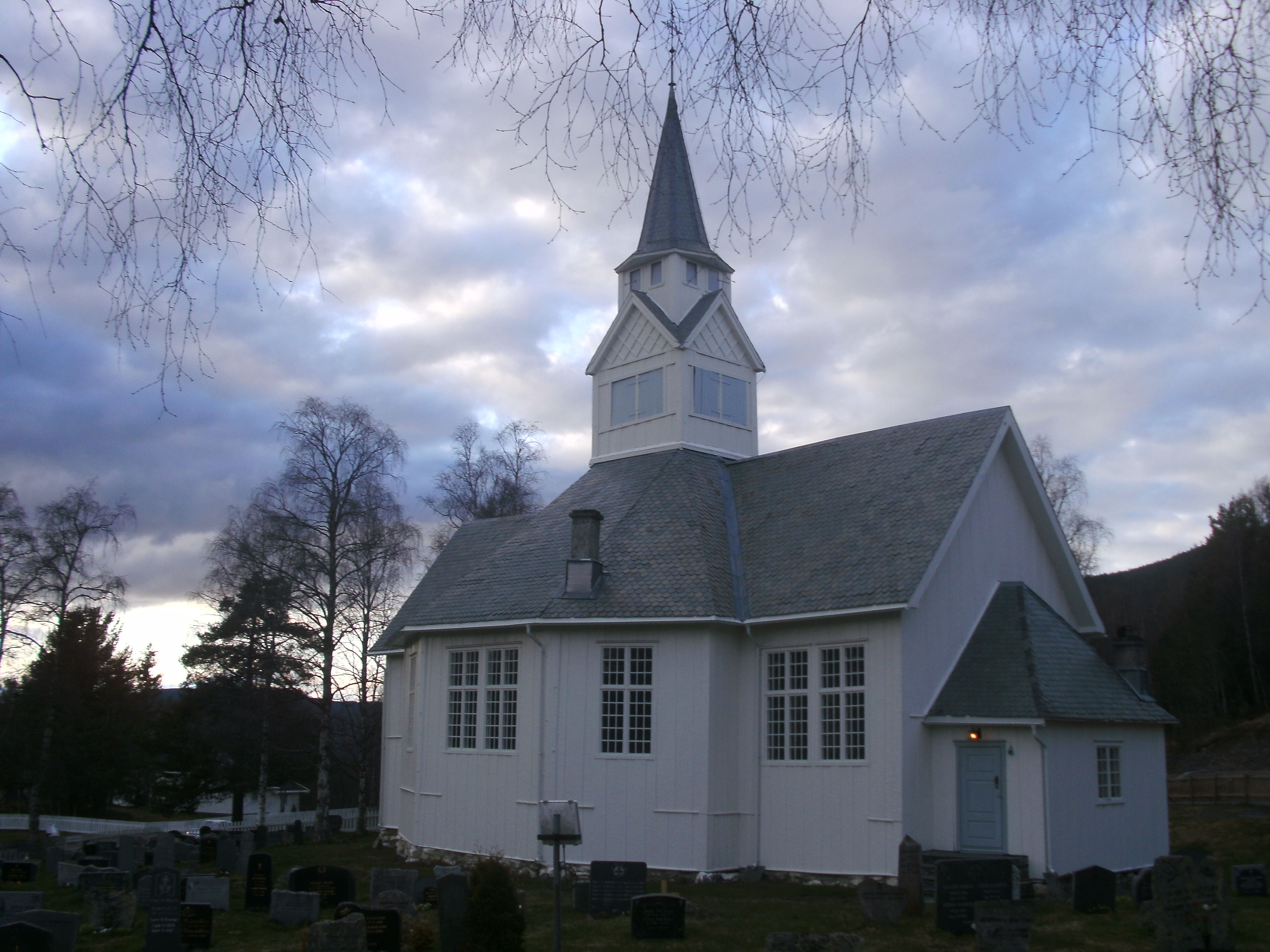 Rogne Kirke i Øystre Slidre